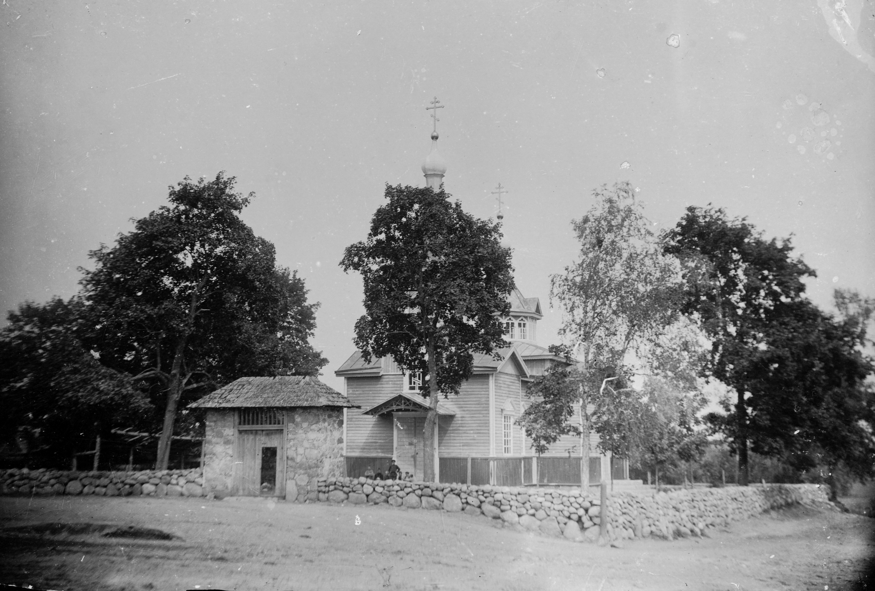 Беларуская (тарашкевіца): Вязынь (Viazyń). Прачысьценская царква-мураўёўка